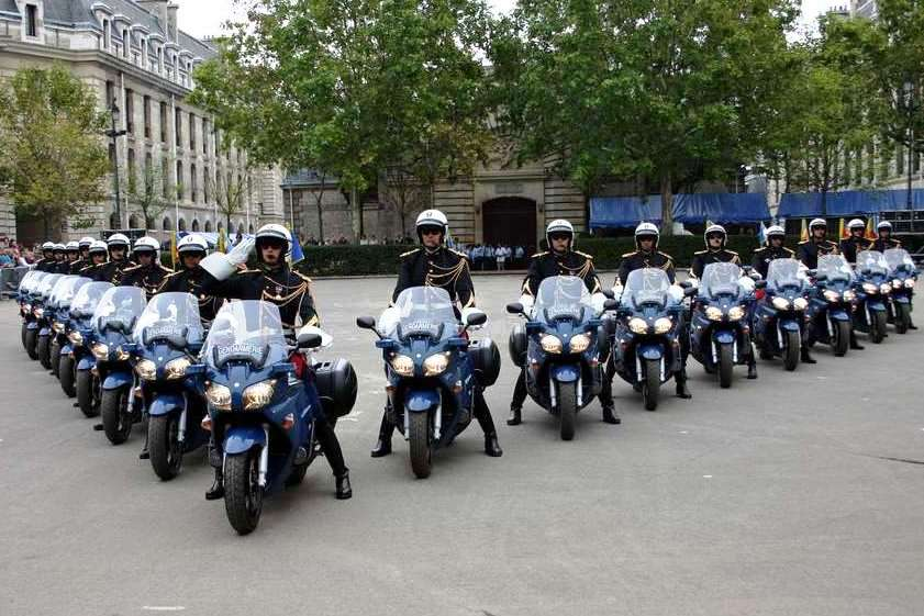 Garde républicaine escadron motocycliste et infanterie op der Porte ouverte vun der Garde républicaine, 2007, am Quartier Célestins zu Paräis, op Yamaha..